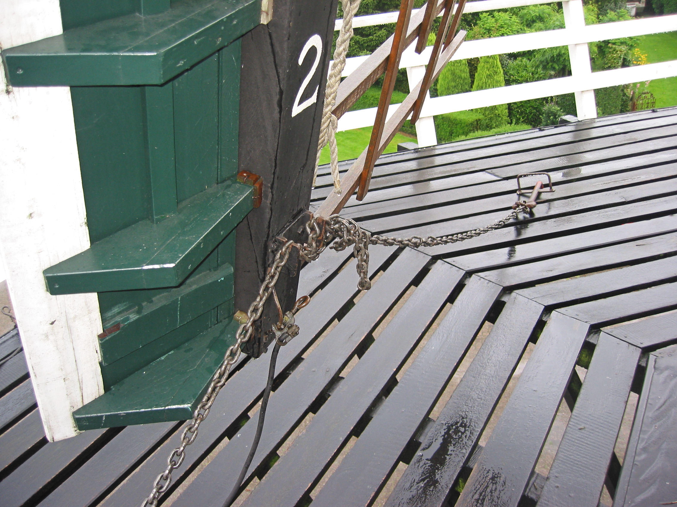 Vastgelegde wiek van Walderveensemolen in Walderveen, Gelderland, the Netherlands